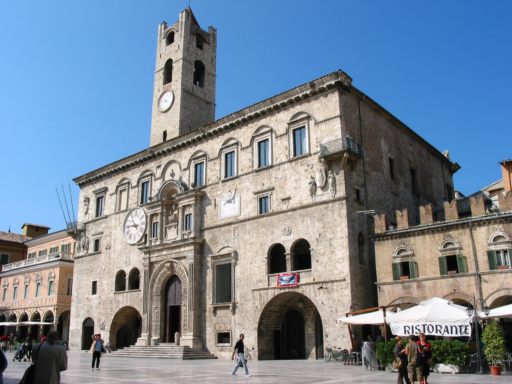 Ascoli Piceno, Marche, Italiasept.11.2003 Ascoli Piceno, Piazza del Popolo